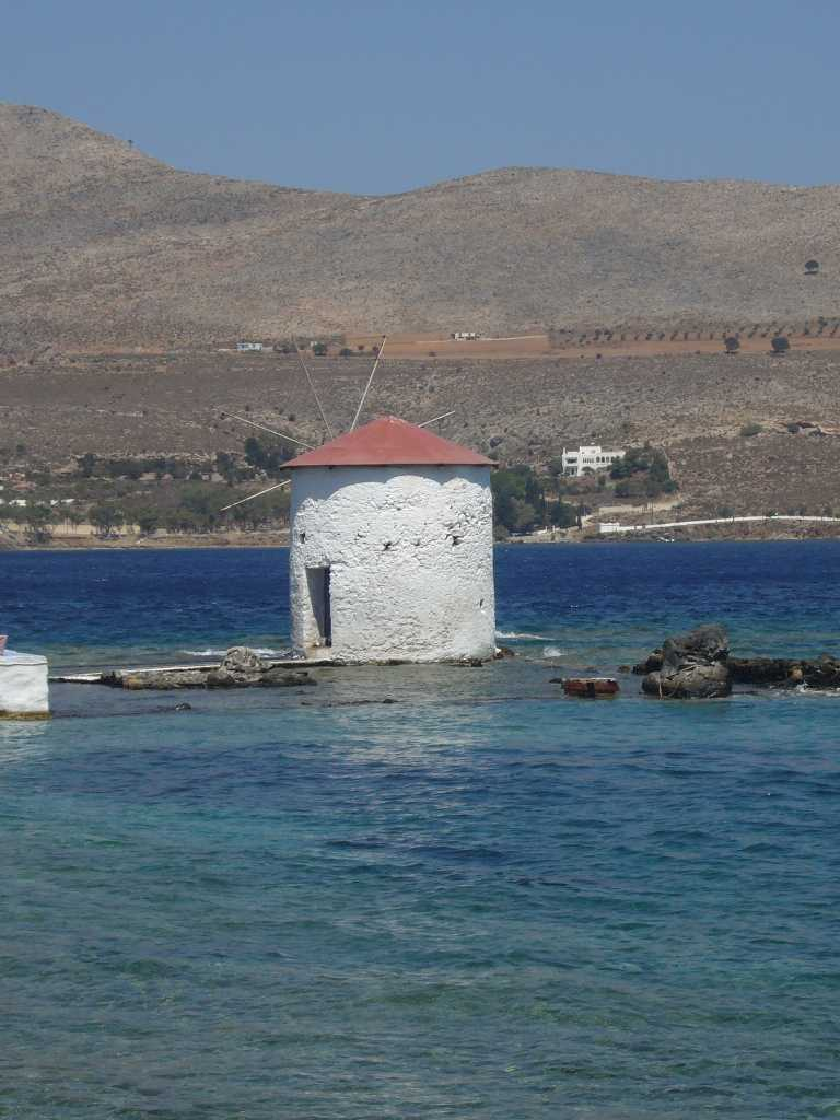 Mühle im Hafen von Agia Marina, Leros